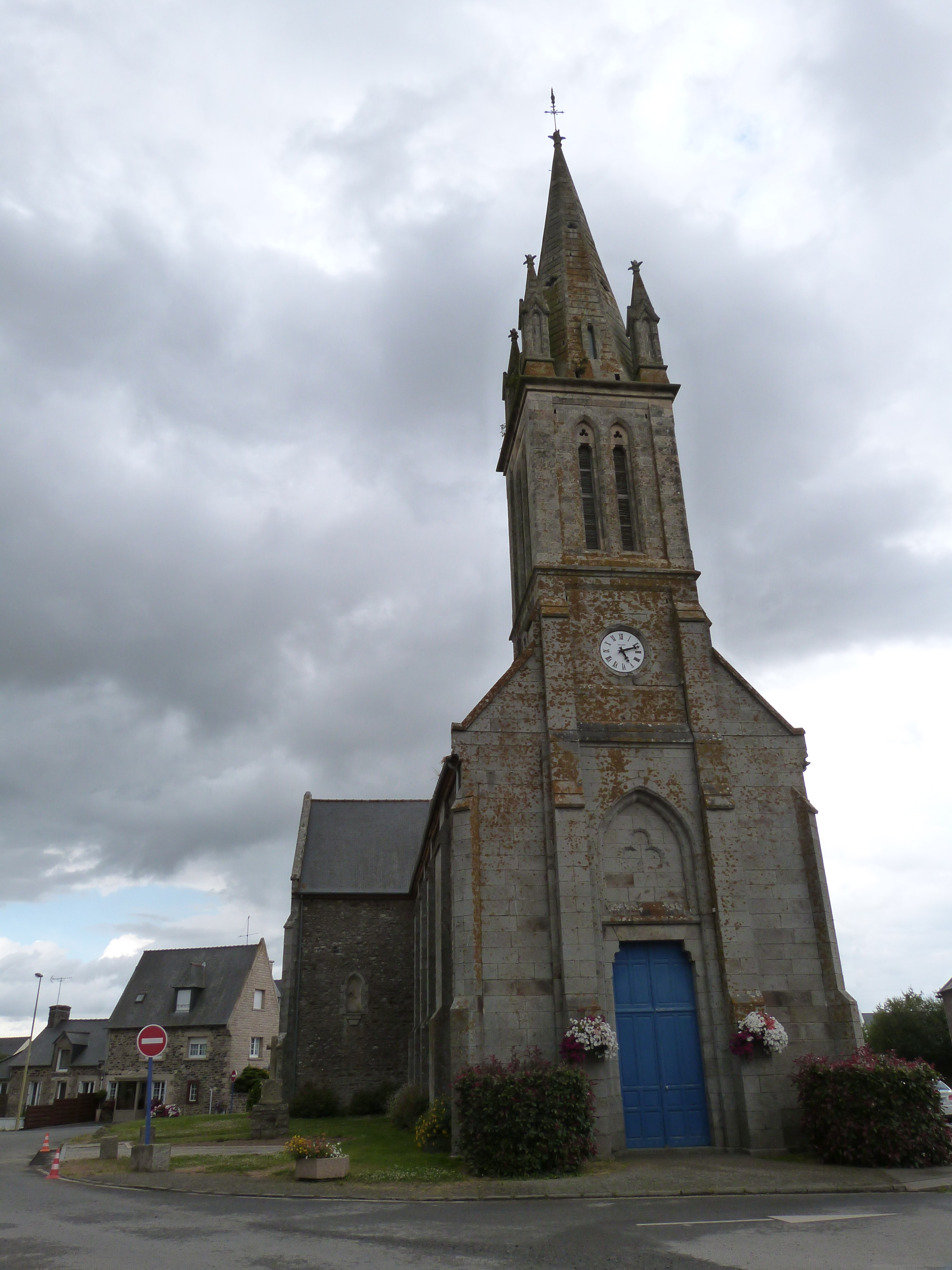 Eglise Notre-dame-et-Saint-Etienne de Tramain